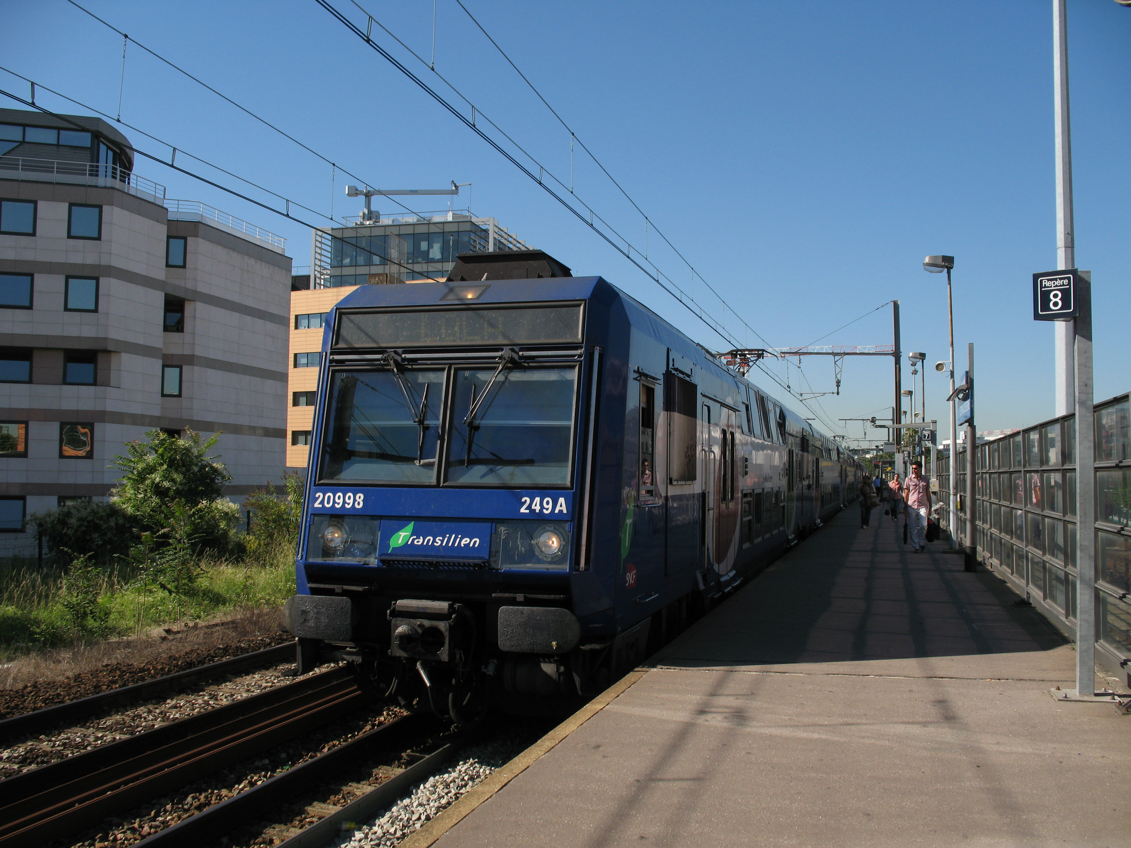 Rame Z 20998 en gare d'Issy Val de Seine sur la ligne C du RER.